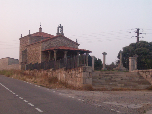 Ermita de San Antonio en Montehermoso, Cáceres, España (2007)